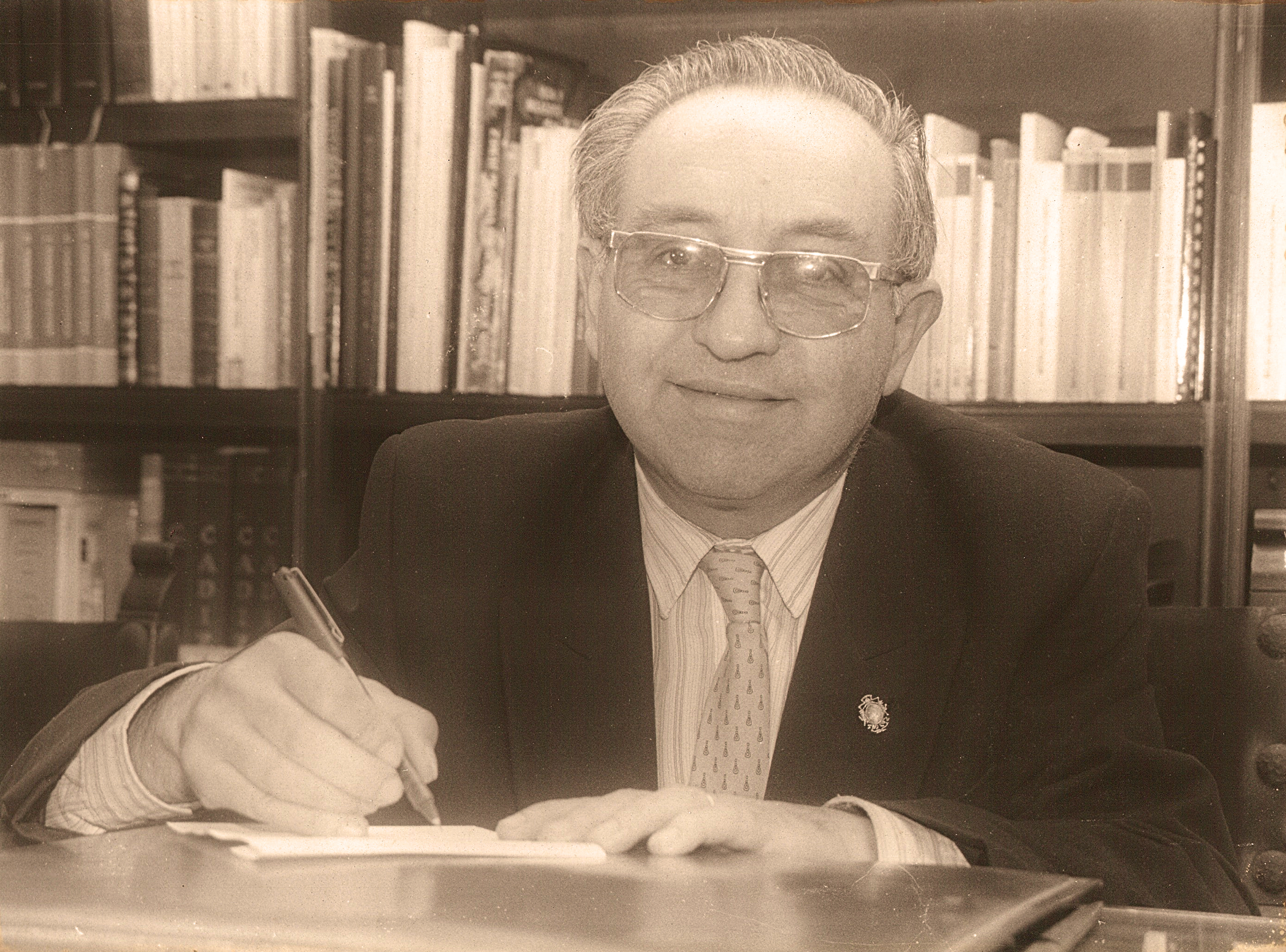 Retrato en la biblioteca familiar